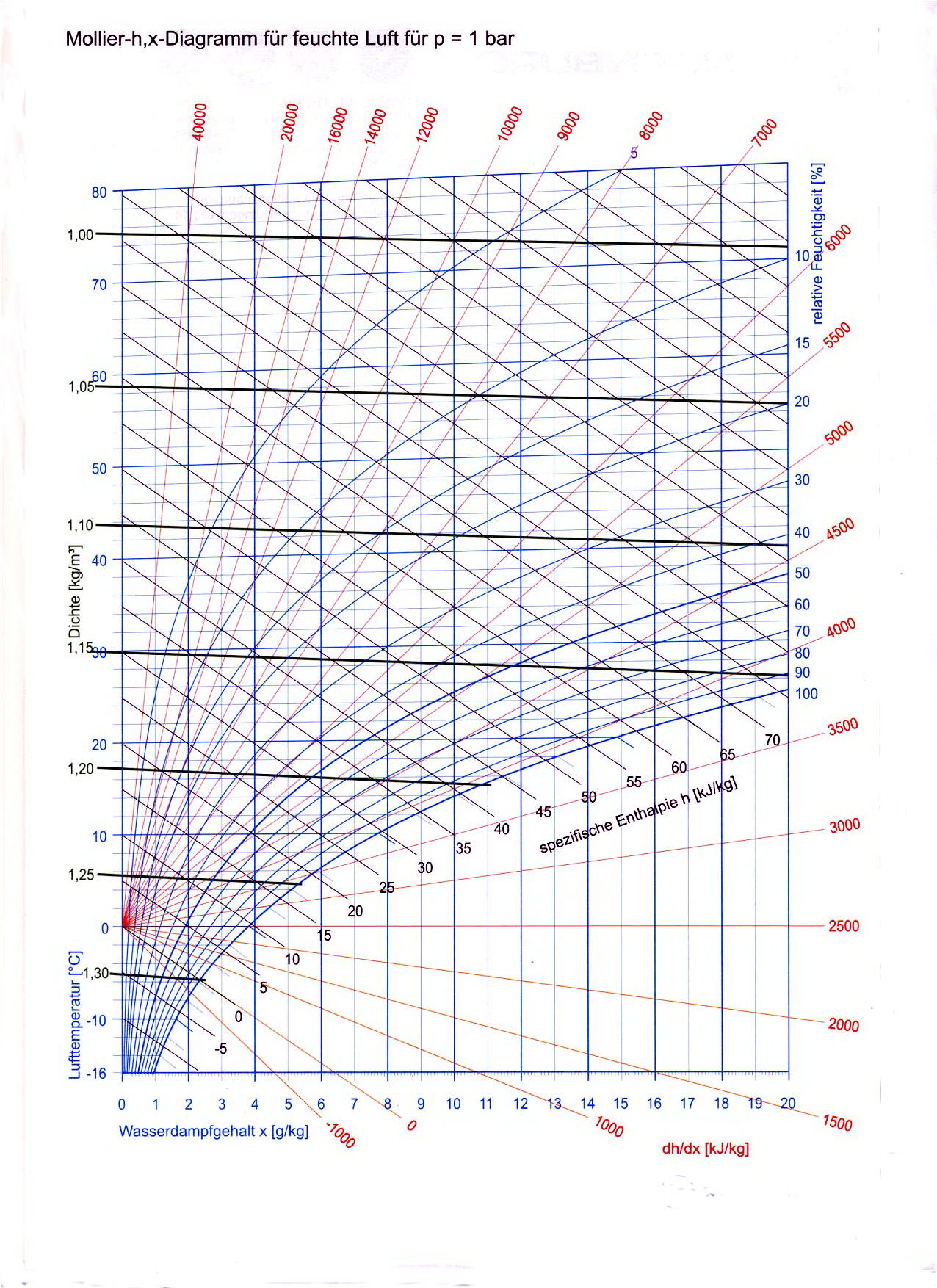 Feuchte Luft, h-x-Diagramm